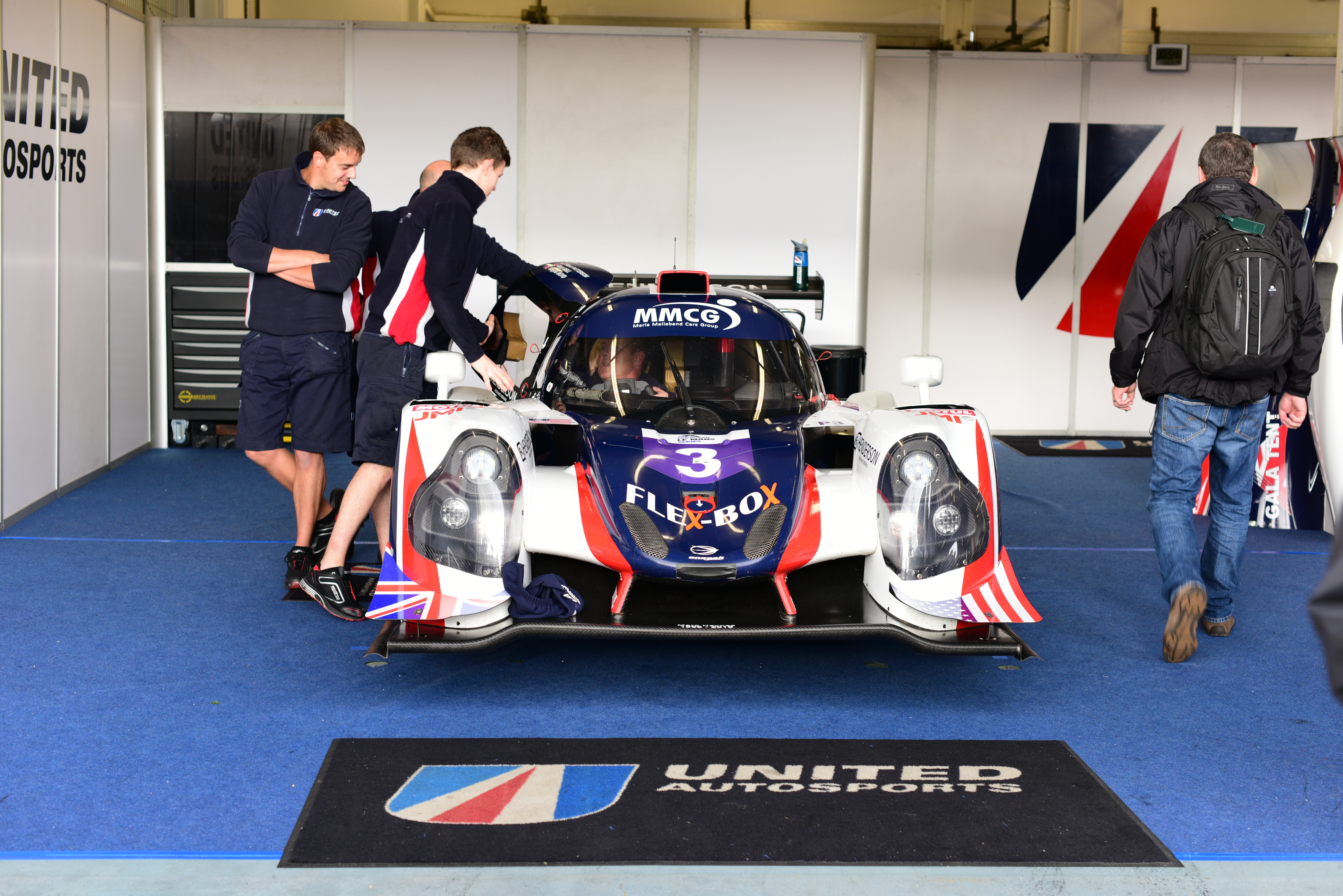 ELMS - 2016 - 4 Horas Estoril - Portugal